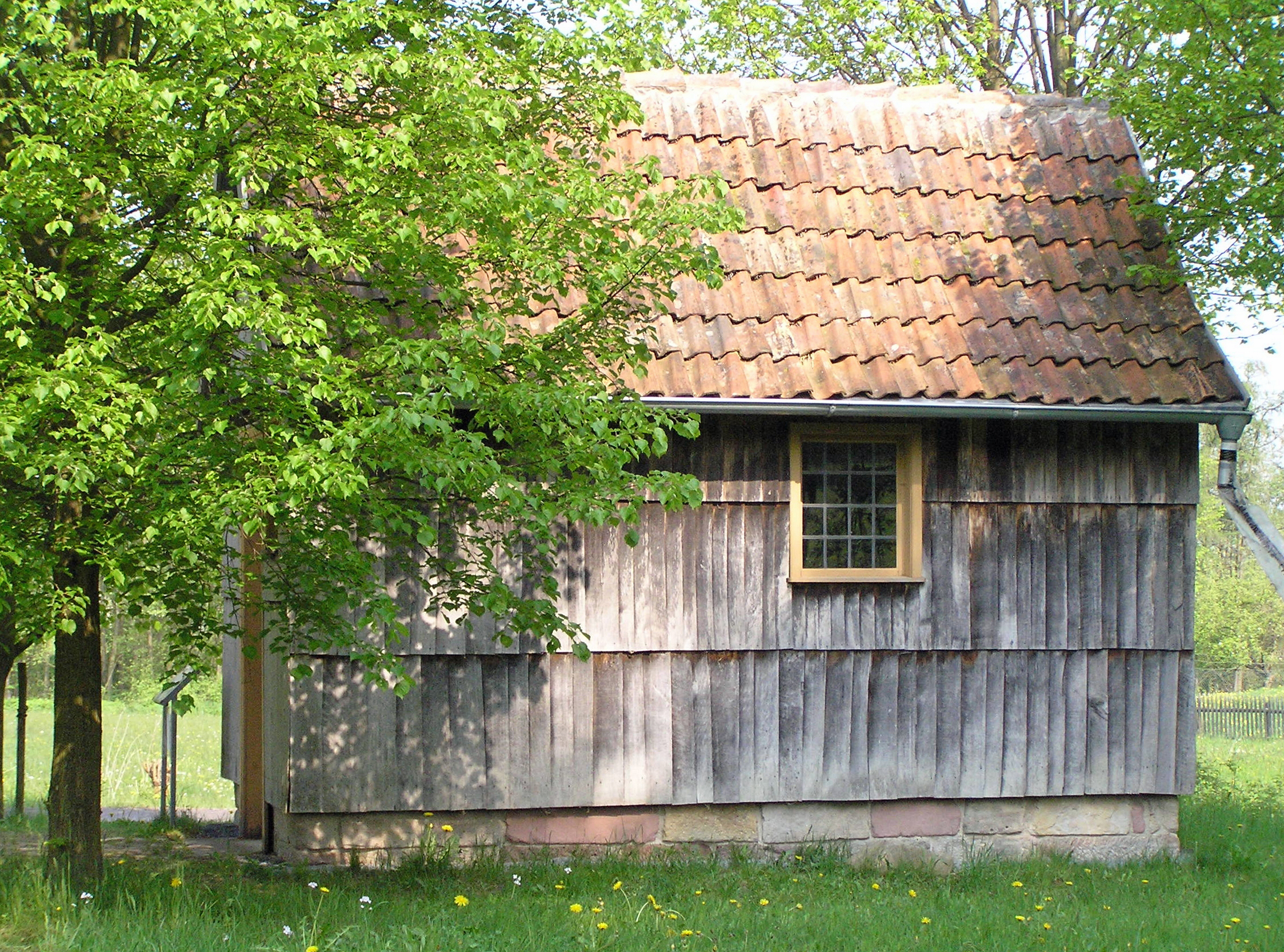 Hessenpark, Wegekapelle aus Weyers